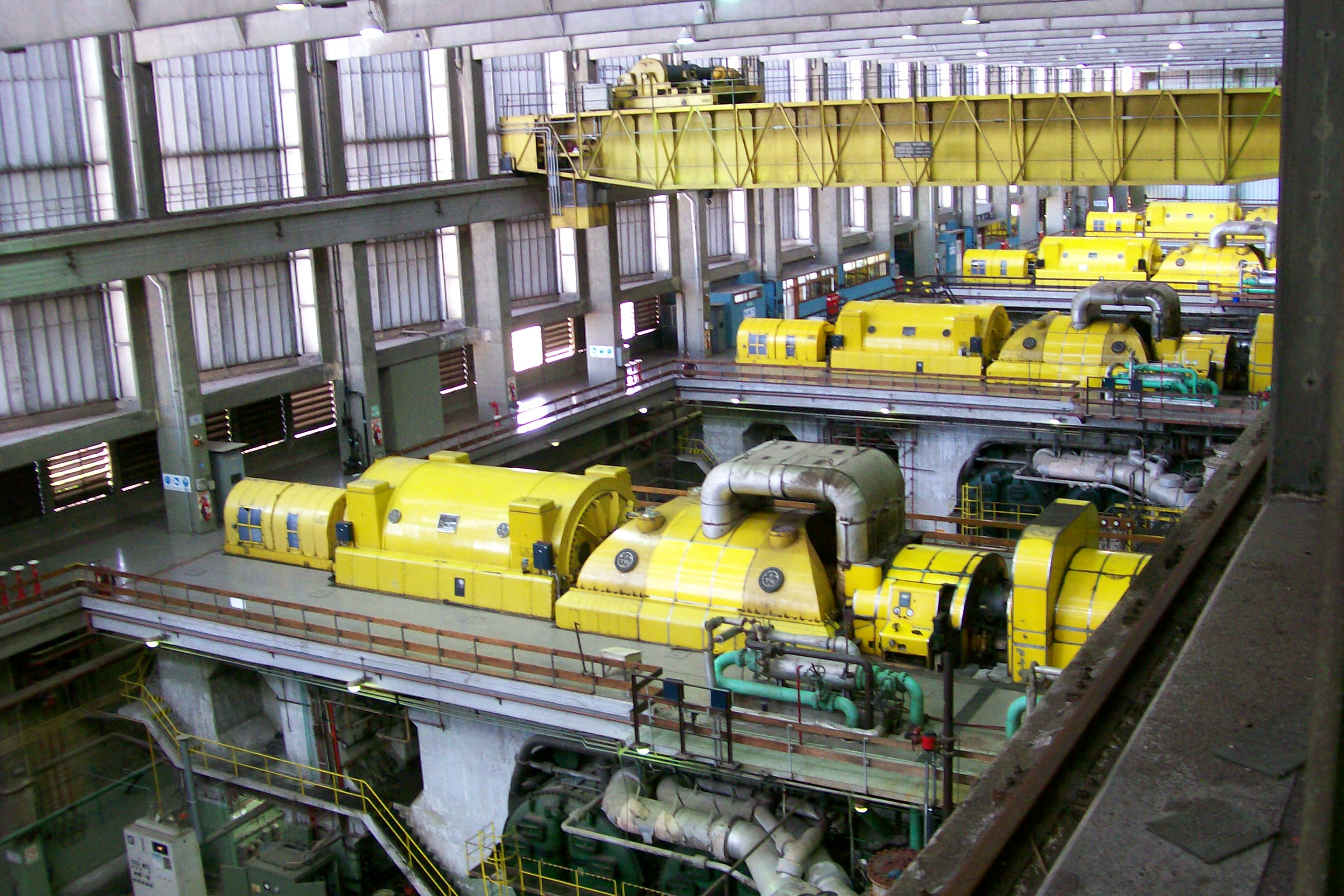 Vista de los turbogrupos British Thomson-Houston 1 a 4, funcionando en Central Costanera, Buenos Aires, Argentina. De izquierda a derecha se aprecia la excitatriz, alternador, etapa de baja presión, etapa de media presión, y etapa de alta presión